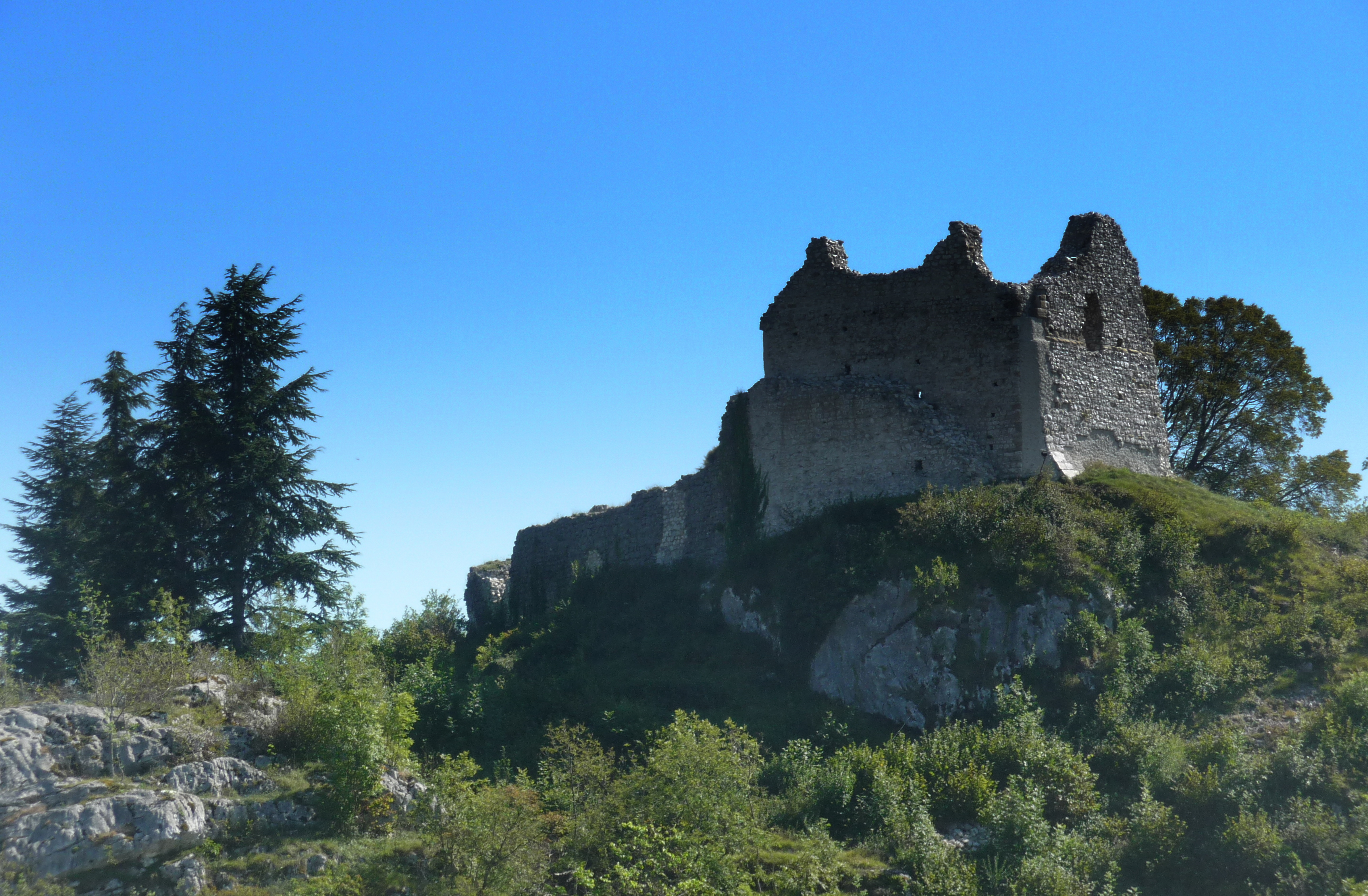 Ruines du château de Chaumont (Haute-Savoie)